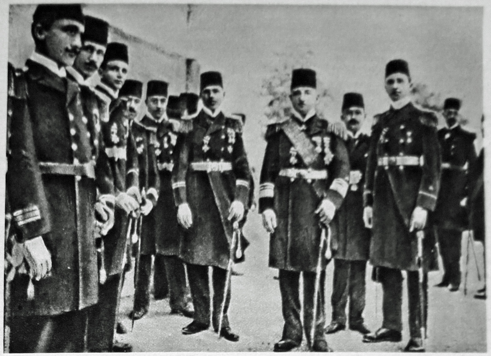 Le Miroir N°113, page_5_vue de l'amiral_Souchon_et_ses_officiers.